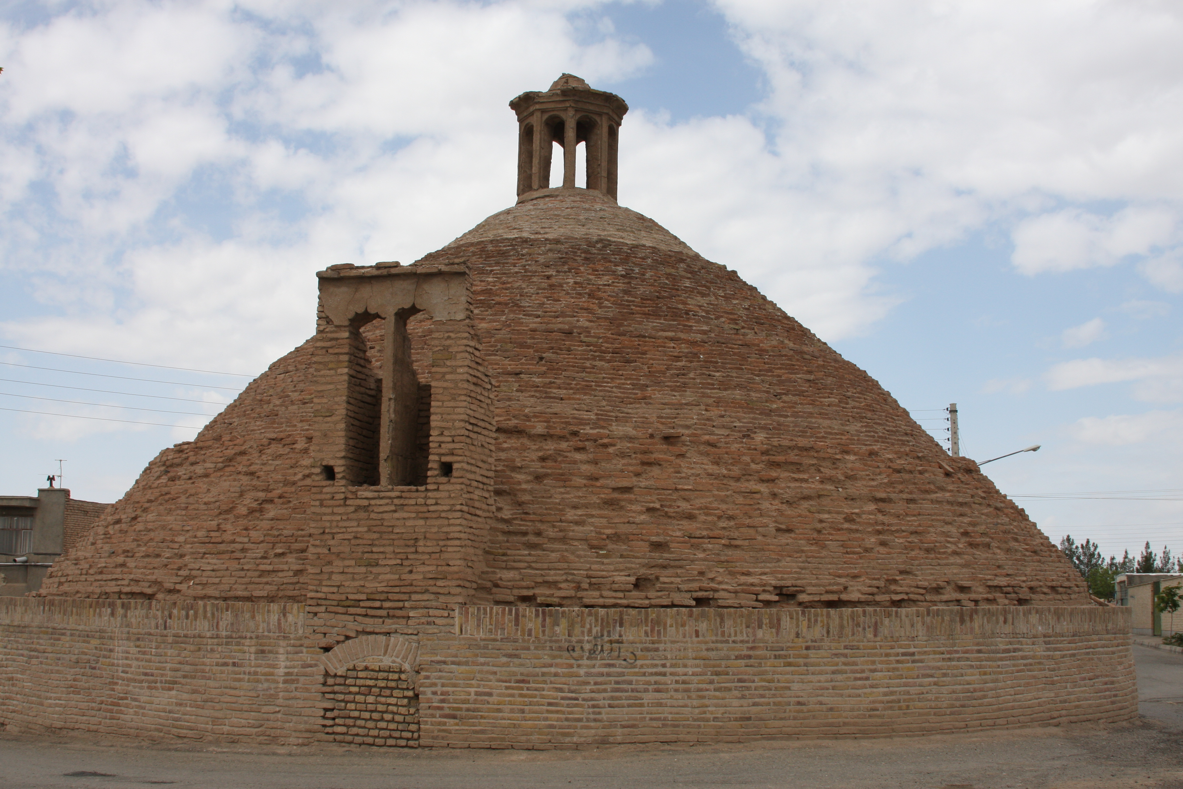 آب انبار سید باقر